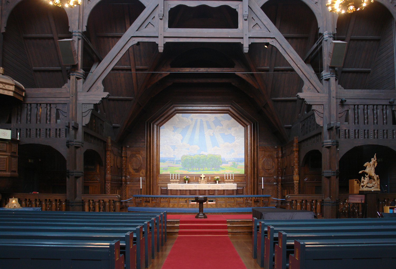 Kirche von Kiruna: Der Hauptaltar, darüber ein Gemälde des schwedischen Prinzen Eugen. Von Christian Ericsson stammt die Statue „Der Heilige Georg im Kampf mit dem Drachen“ (rechts).